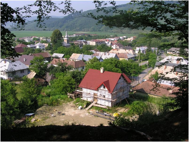 Celkový pohľad